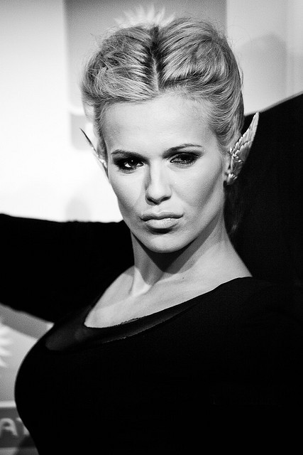 Doda na wiosennej ramówce Polsatu 18 lutego 2010